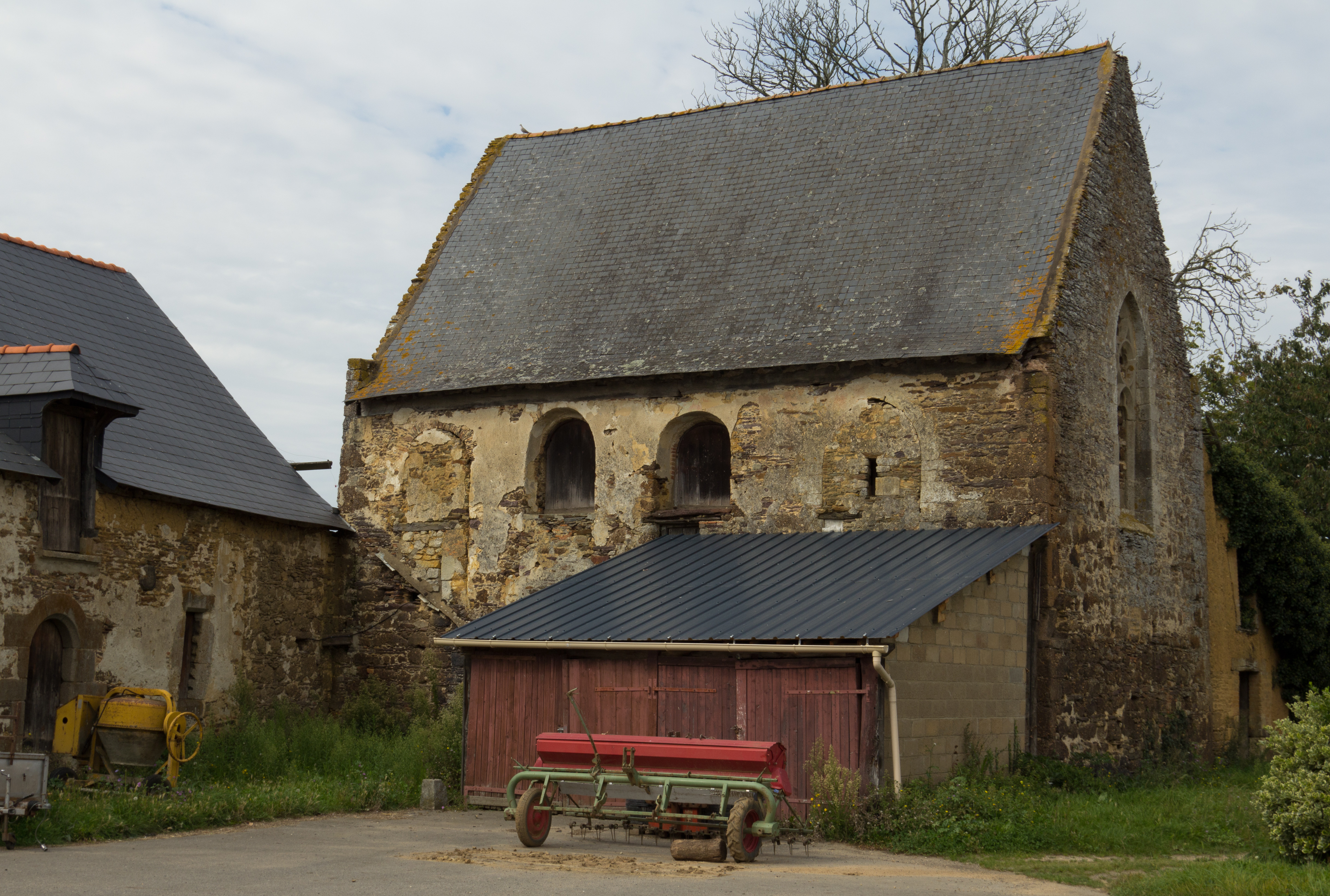 Façade sud de la chapelle du château de Fontenay. Deux des quatre fenêtres cintrées sont murées, les deux autres sont condamnées. Une grande fenêtre, également murée, est visible sur le pignon est. Deux appentis sont appuyés aux murs nord et sud.